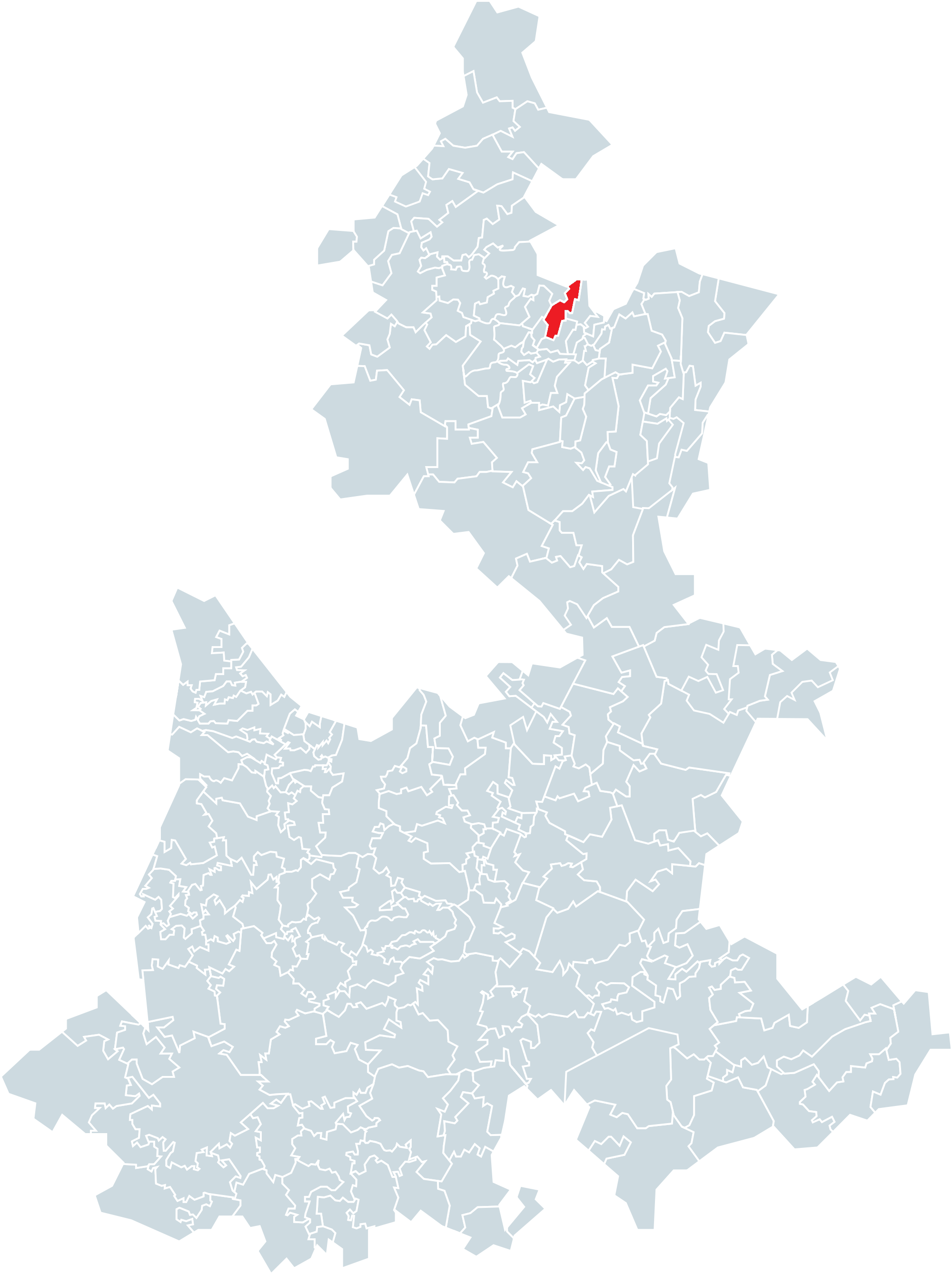 Municipio de Olintla